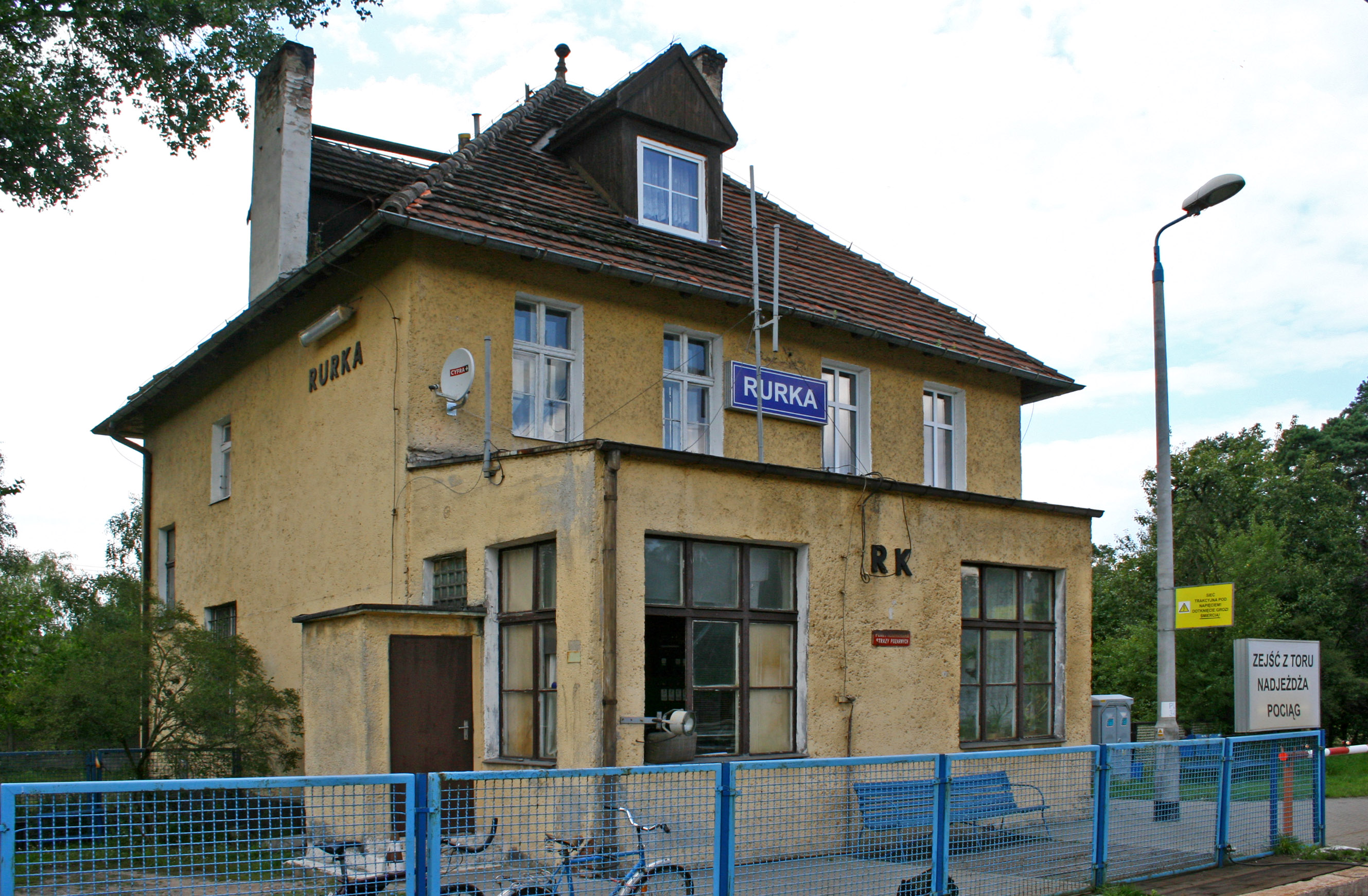 Stacja kolejowa w Rurce (woj. zachodniopomorskie)